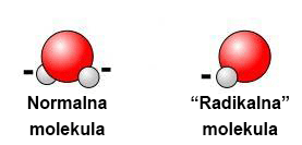 U normalnoj molekuli jezgra je okružena s parom negativno nabijenih elektrona. Uklanjajući jedan elektron iz para kroz proces nazvan oksidacija, molekula postaje nestabilna i destruktivna. Tako se stvara molekula slobodnog radikala koja napada druge biomolekule u svom okruženju i stvara nove slobodne radikale te započinje lančanu reakciju.